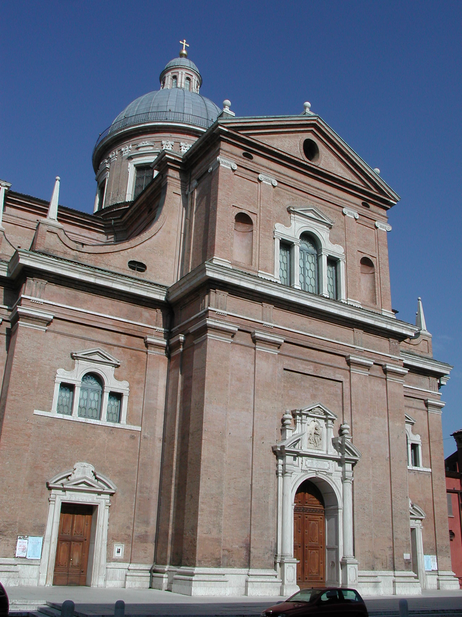 Basilica della Madonna della Ghiara (Reggio Emilia), Reggio Emilia, Italy Church in Reggio Emilia (basilica della Ghiara) Paolo da Reggio